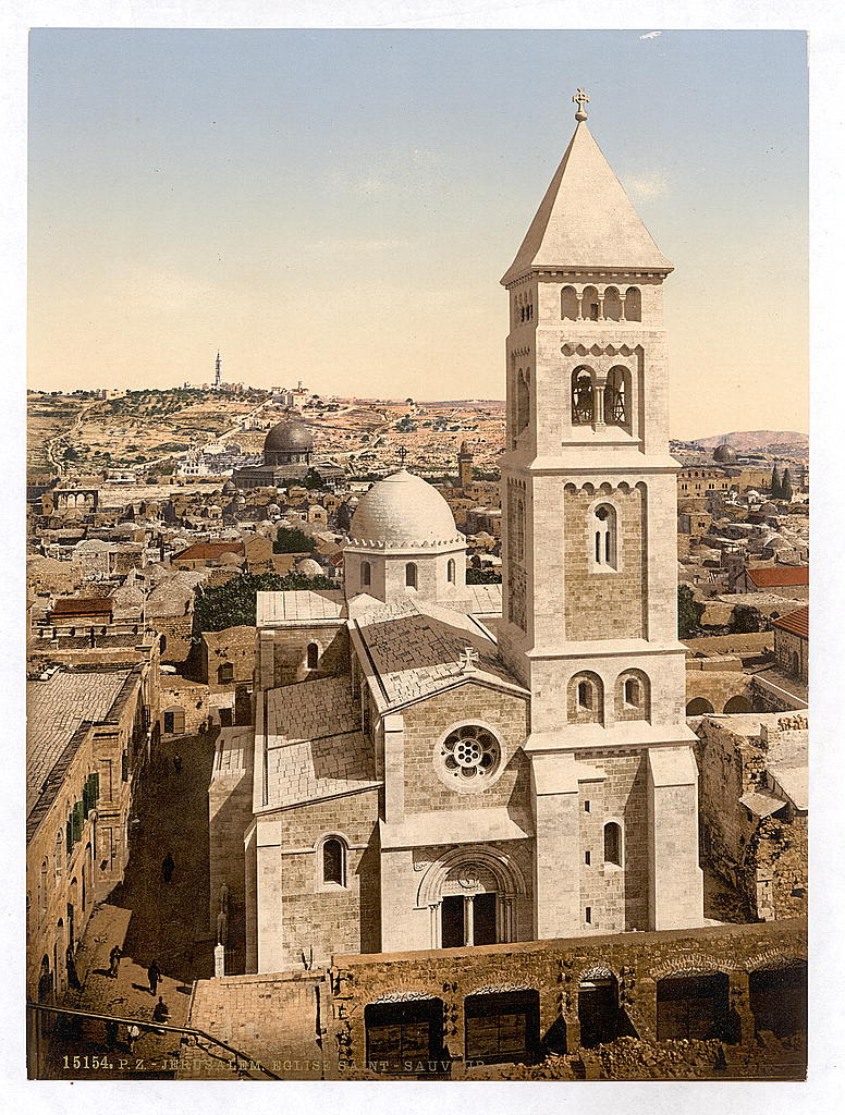 Jerusalem, Erlöserkirche, zwischen 1898 und 1900, Blick von Westen.